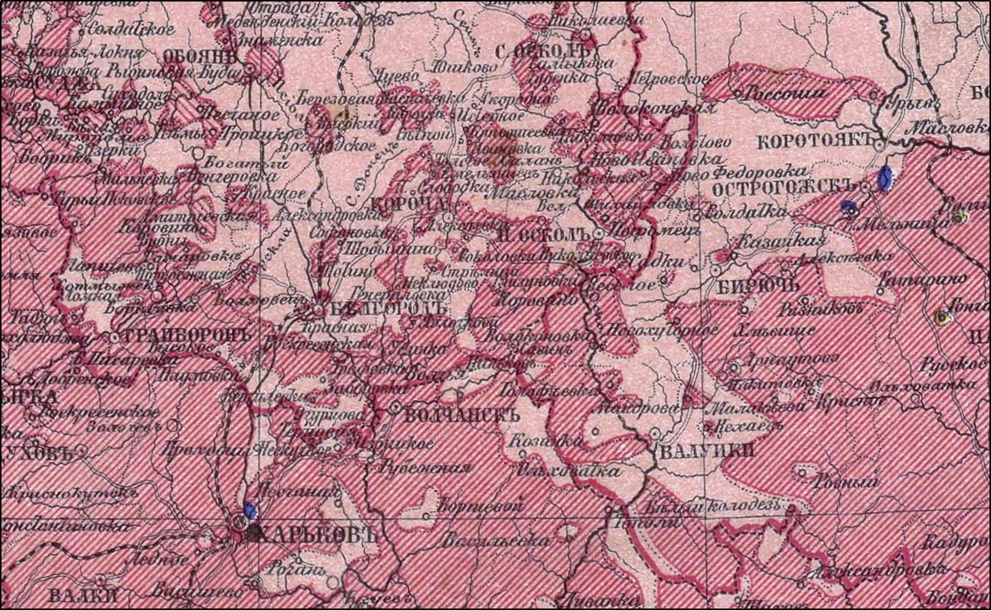 Этнический состав северной Слобожанщины